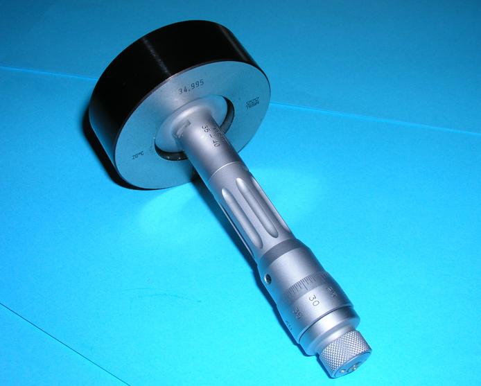 Micromètre d'intérieure trois touches dans la bague de réglage en position de mesure.